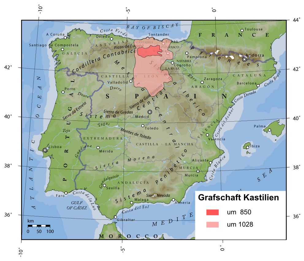 jetzt als png